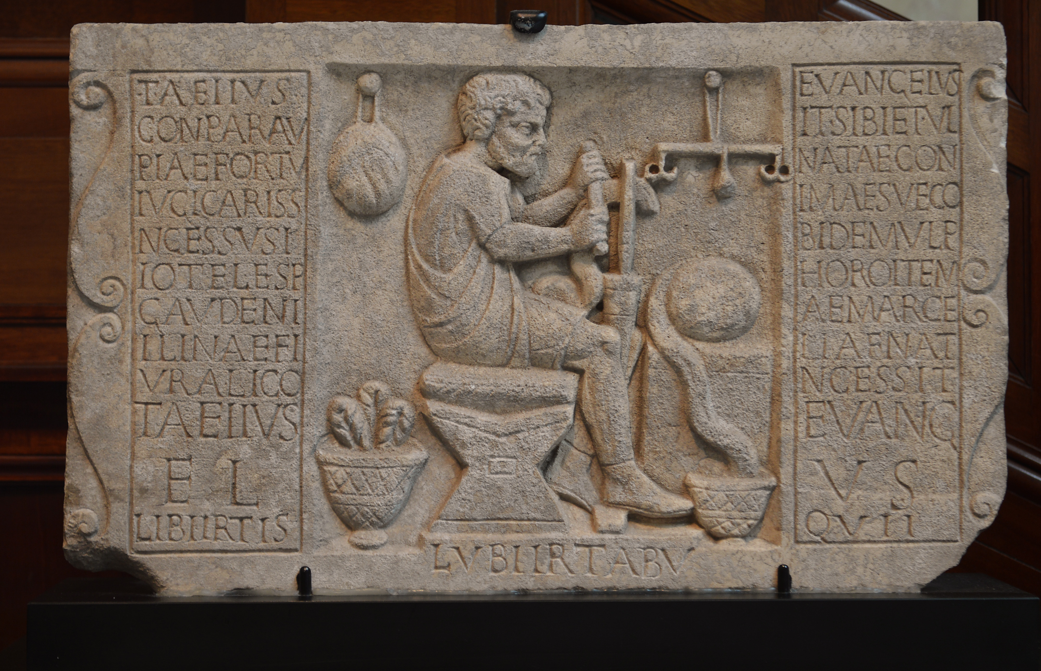 Reliefen, en s.k. loculus-platta, som har angett platsen för en grav, visar en ullhandlare och olika faser av ullframställning. Den latinska inskriften med mannens namn, Titus Aelius Evangelus, visar att han var en frigiven slav. Marmor. Troligen från Ostia, mitten av 100-talet efter Kristus. This is a photo of an artwork at the Mediterranean Museum in Sweden with the identifier: MM 1997:001